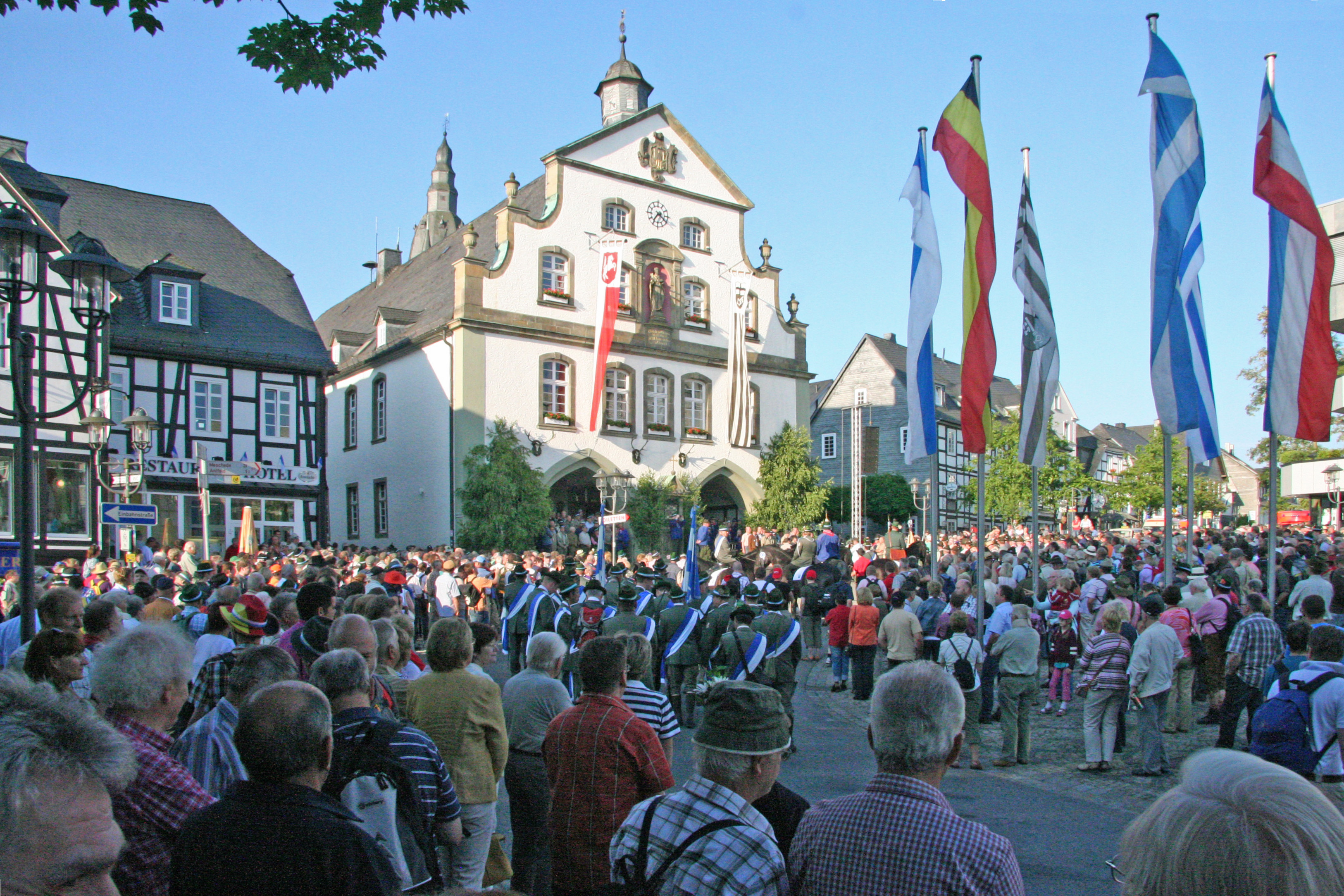 Eröffnung der Schnade 2010 um 7:15